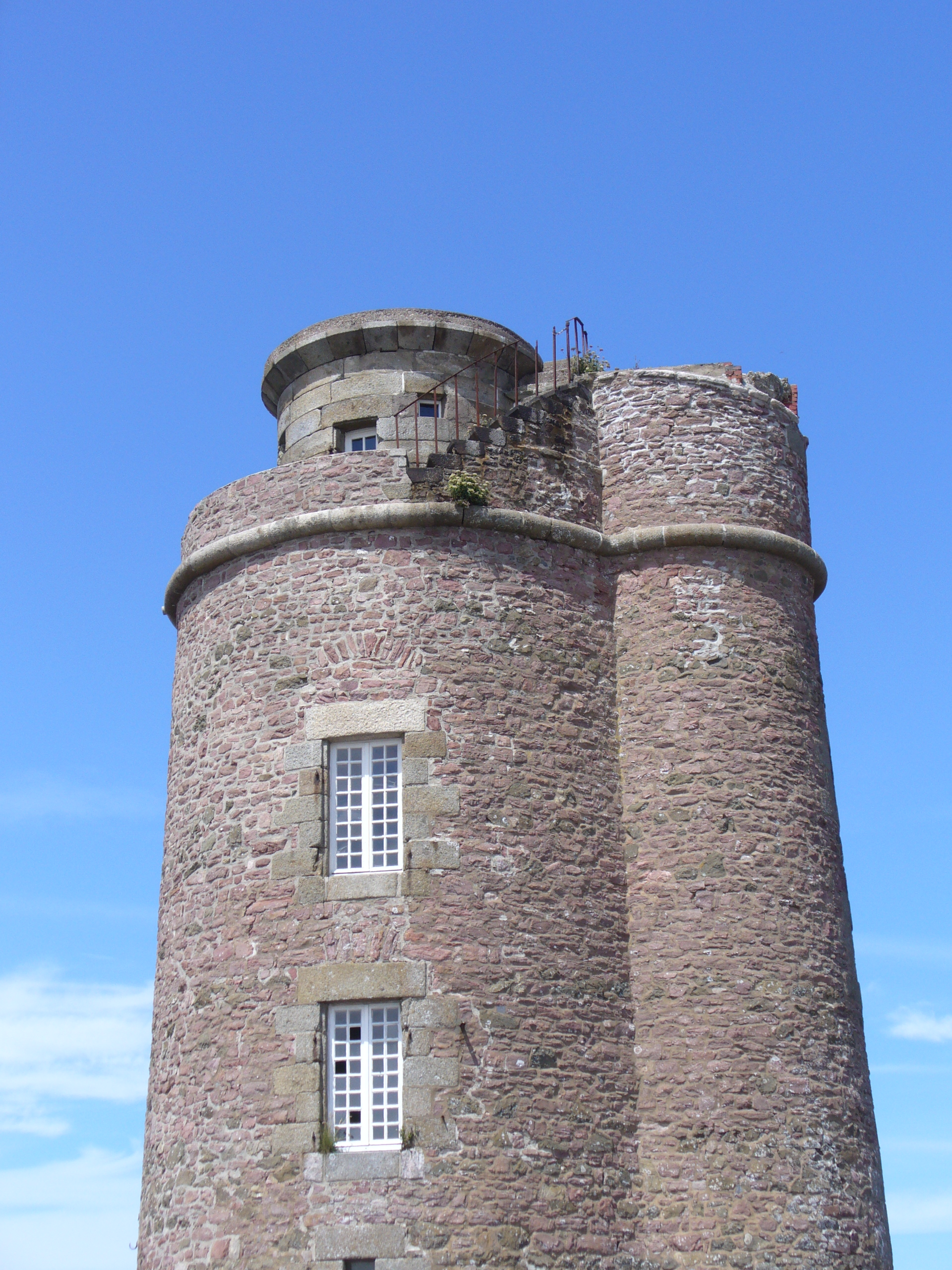 Leuchtturm am Cap Frehel - im 17. Jahrhundert vom Baumeister Vauban erbaut. Cote de Emeraude, village Plevenon im Departement Cote de Armor, Region Bretagne gelegen